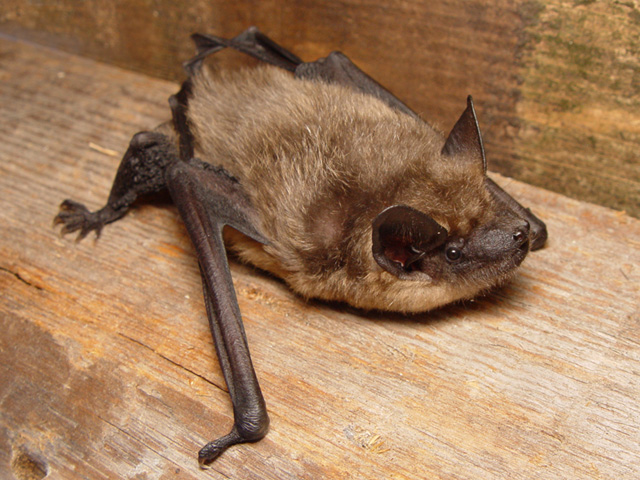 Serotine bat (Eptesicus serotinus) German Description: Breitflügelfledermaus (Eptesicus serotinus)